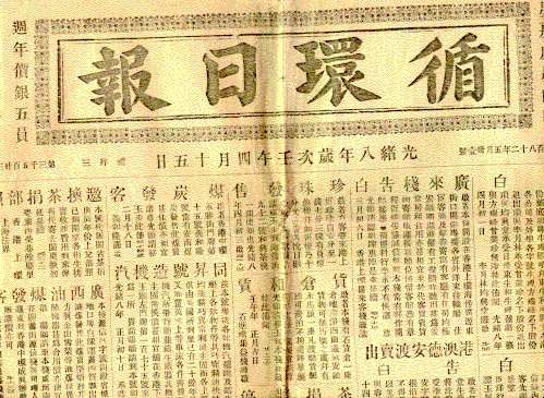 1882 Hong Kong newspaper光绪八年循环日报